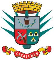 Escudo municipal de Cacalchén (Yucatán).